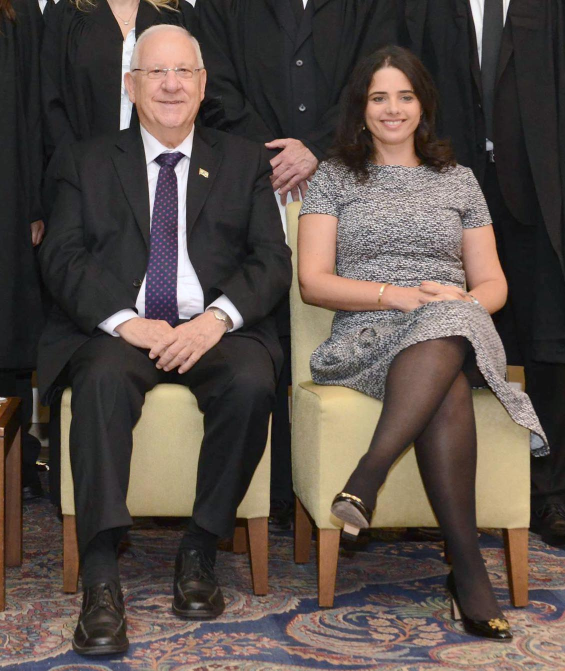 טקס השבעת שופטים בית משפט שלום ומחוזי שהתקיים בבית נשיא מדינת ישראל ראובן ריבלין בהשתתפות איילת שקד שרת המשפטים ומרים נאור נשיאת בית המשפט העליון